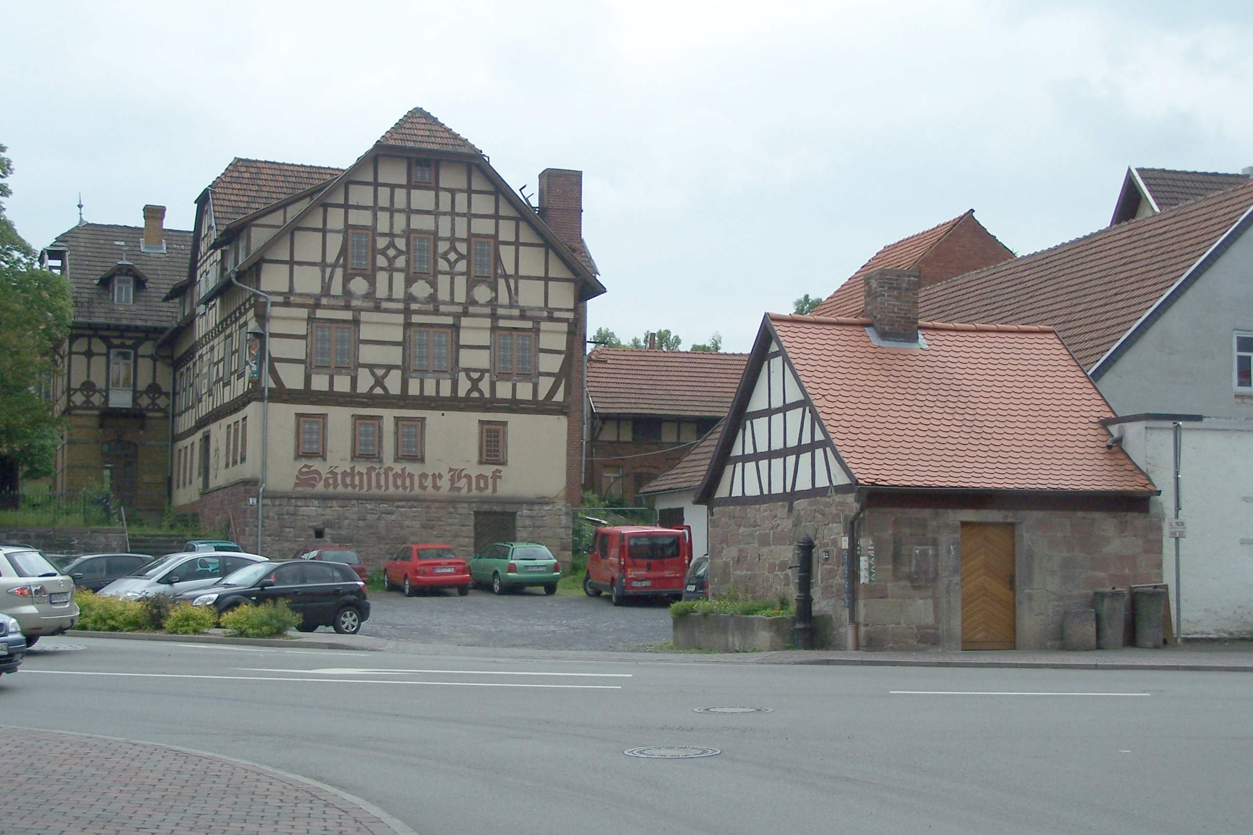 Dermbach